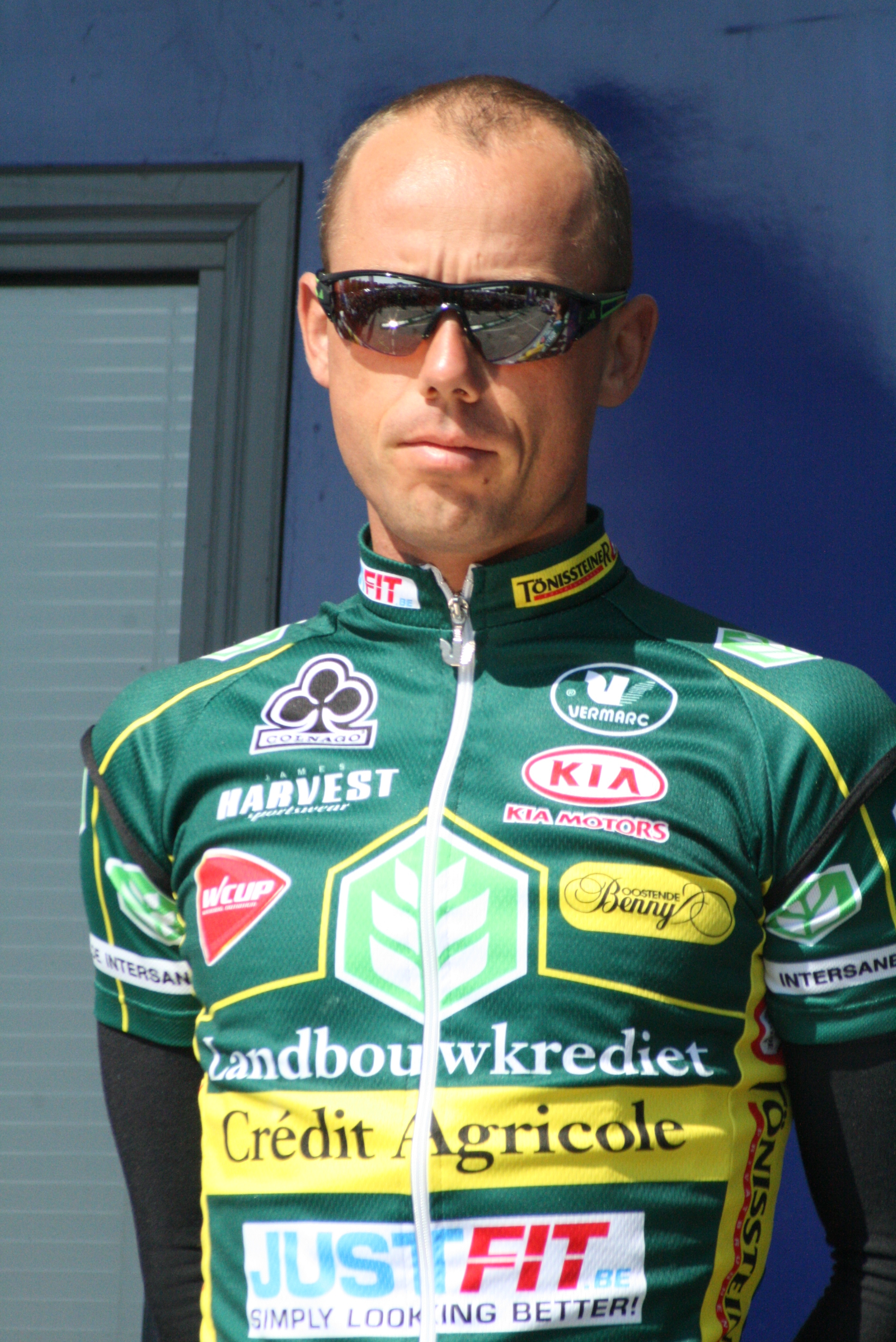 Présentation des coureurs au départ de la première étape Sven Nys